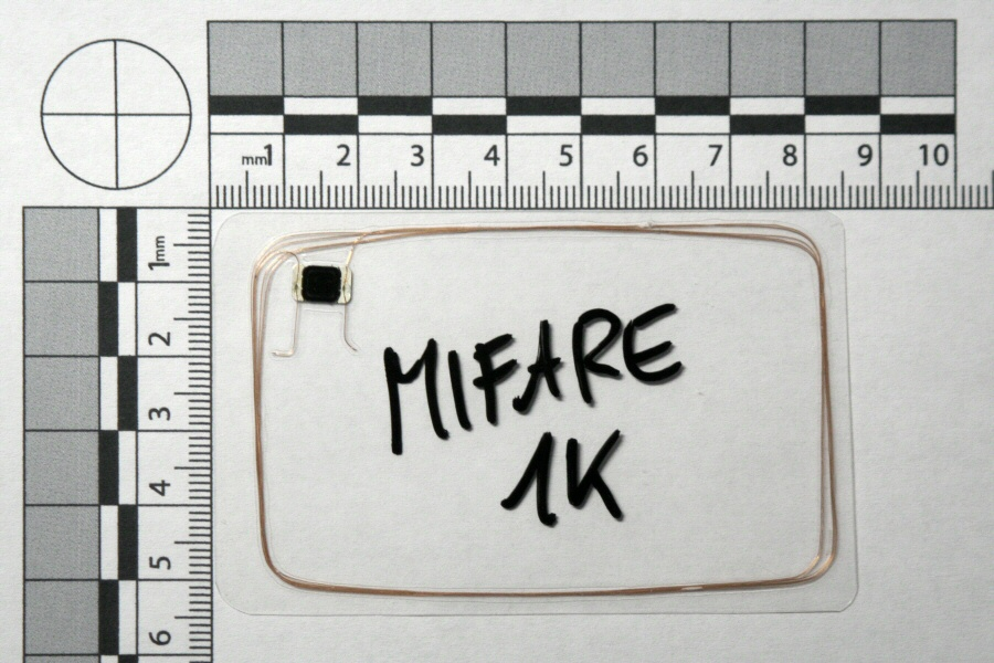 Mifare 1k RFID Karte, transparent